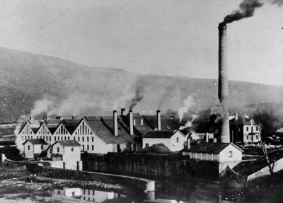 Fábrica La Basconia, posteriormente Altos Hornos de Vizcaya